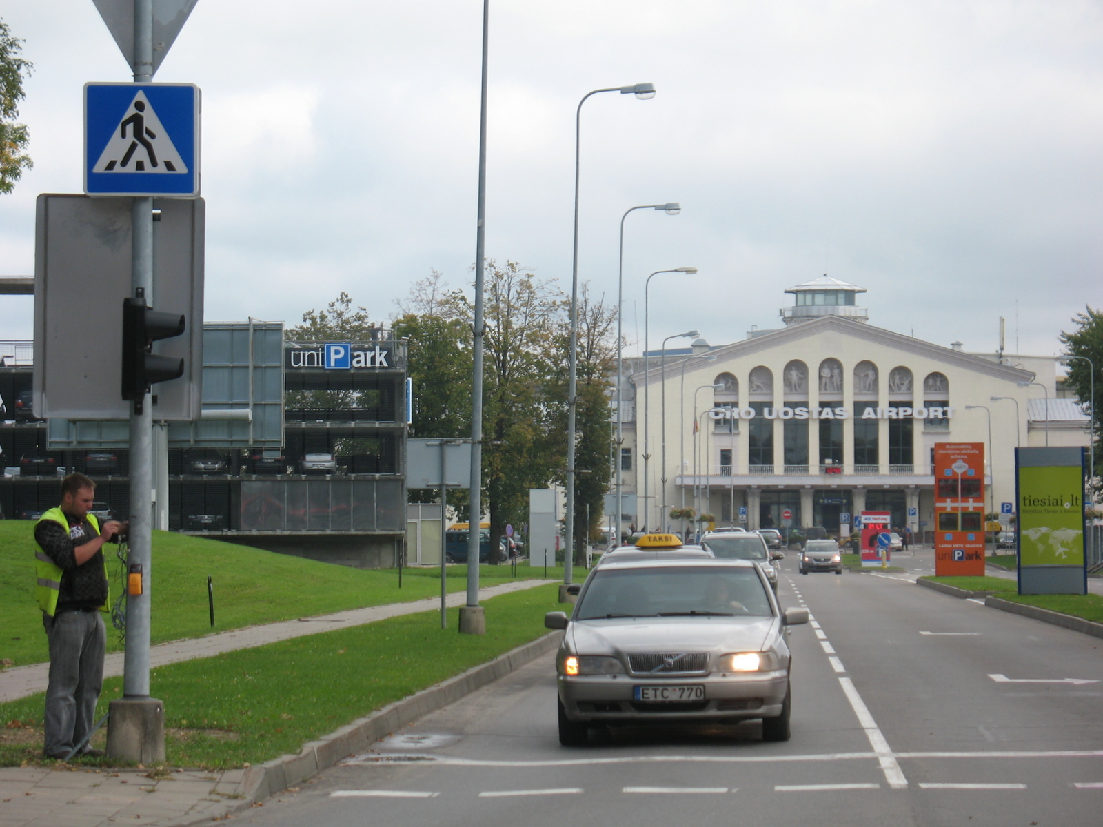 Naujininkai, Vilnius, Lithuania